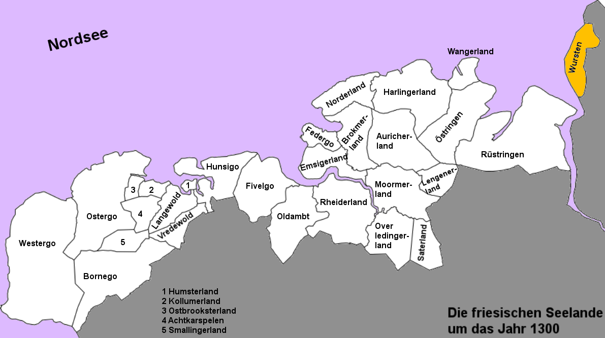 Karte der freien friesischen Seelande (Landesgemeinden) von der Zuiderzee bis zur Weser in den Grenzen um das Jahr 1300, das Land Wursten hervorgehoben. (Karte ohne Inseln.)